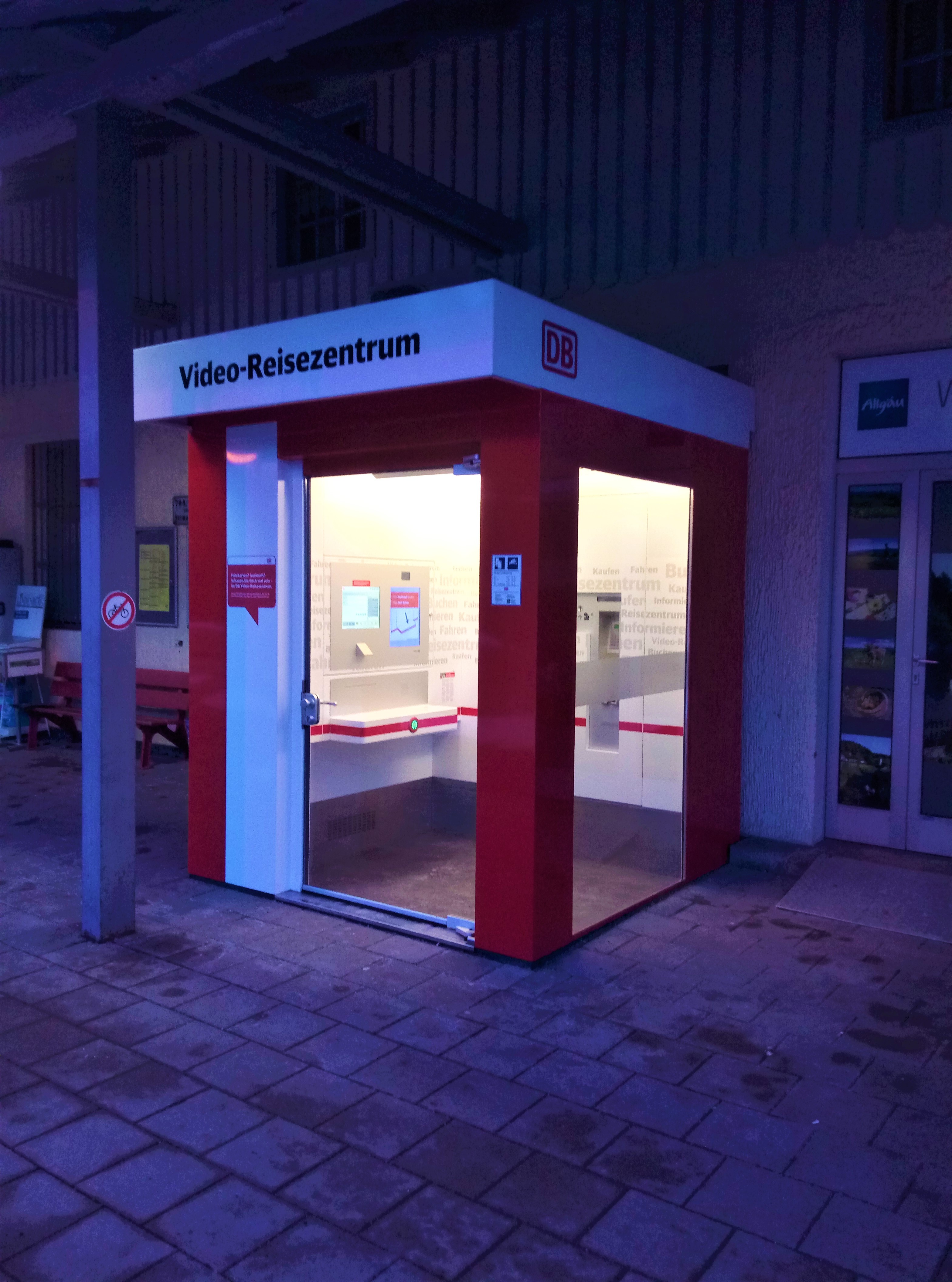 Videoreisezenturm der DB am Bahnhof Röthenbach (Allgäu)